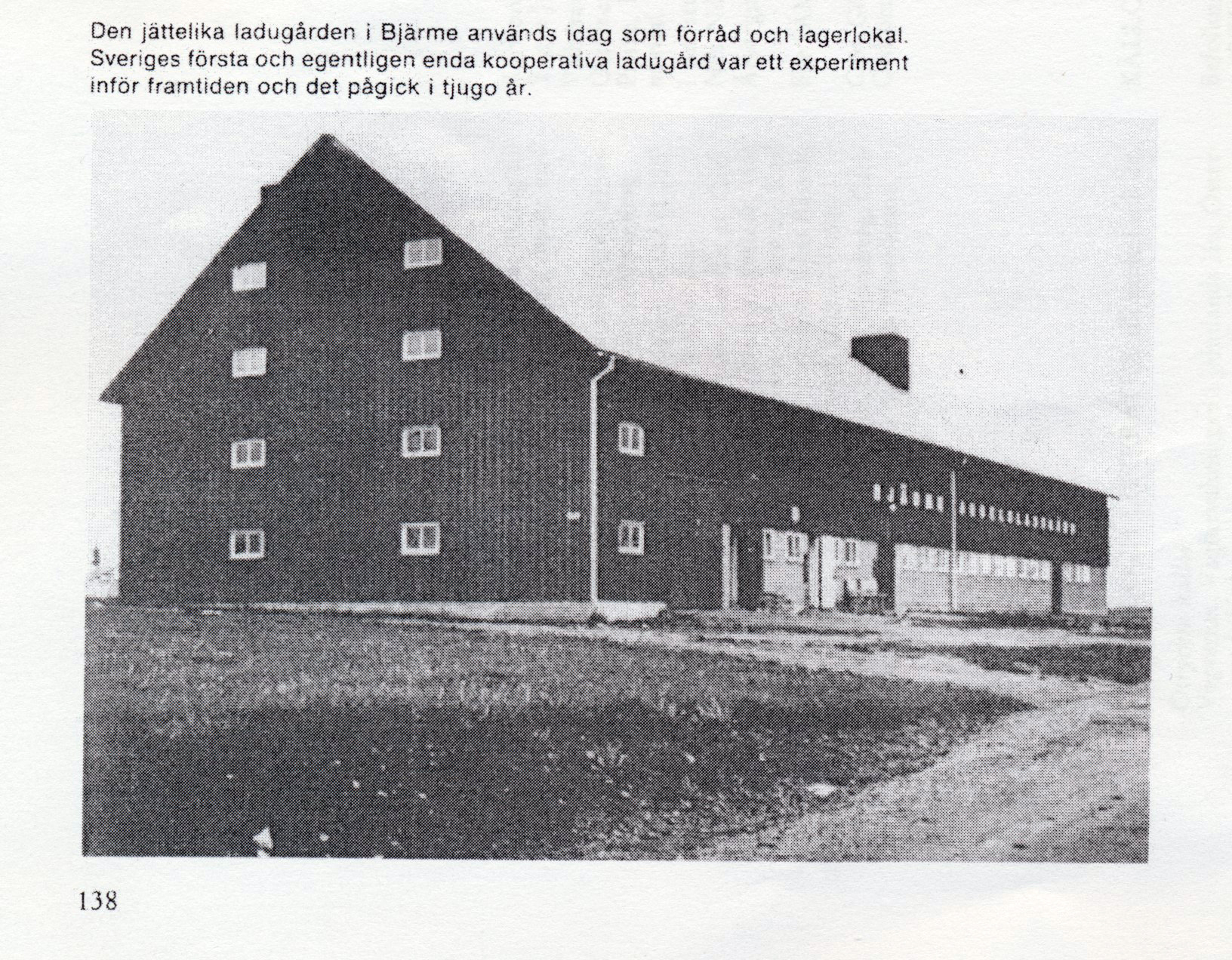 Andelsladugård